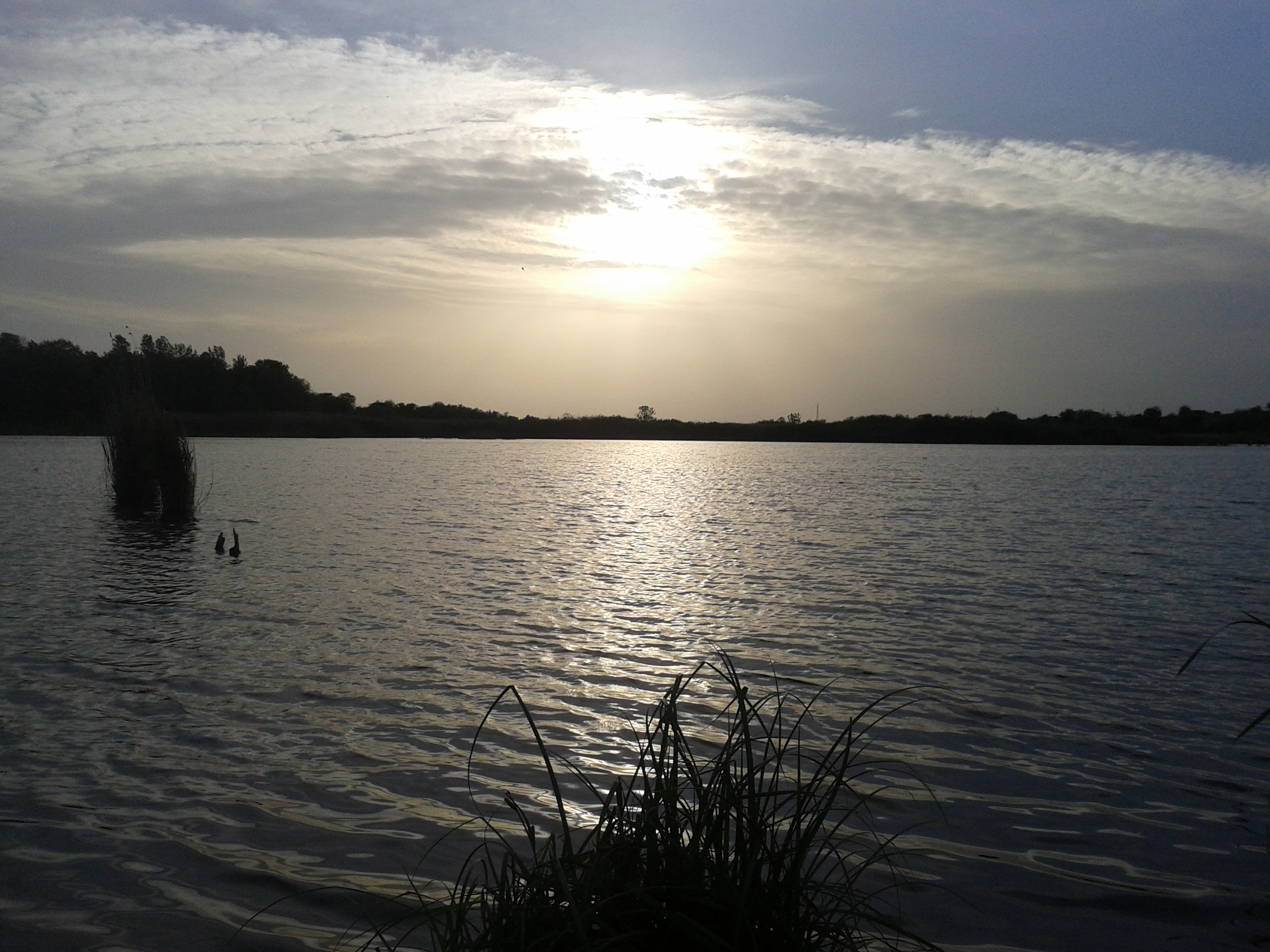 Специјални резерват природе Краљевац